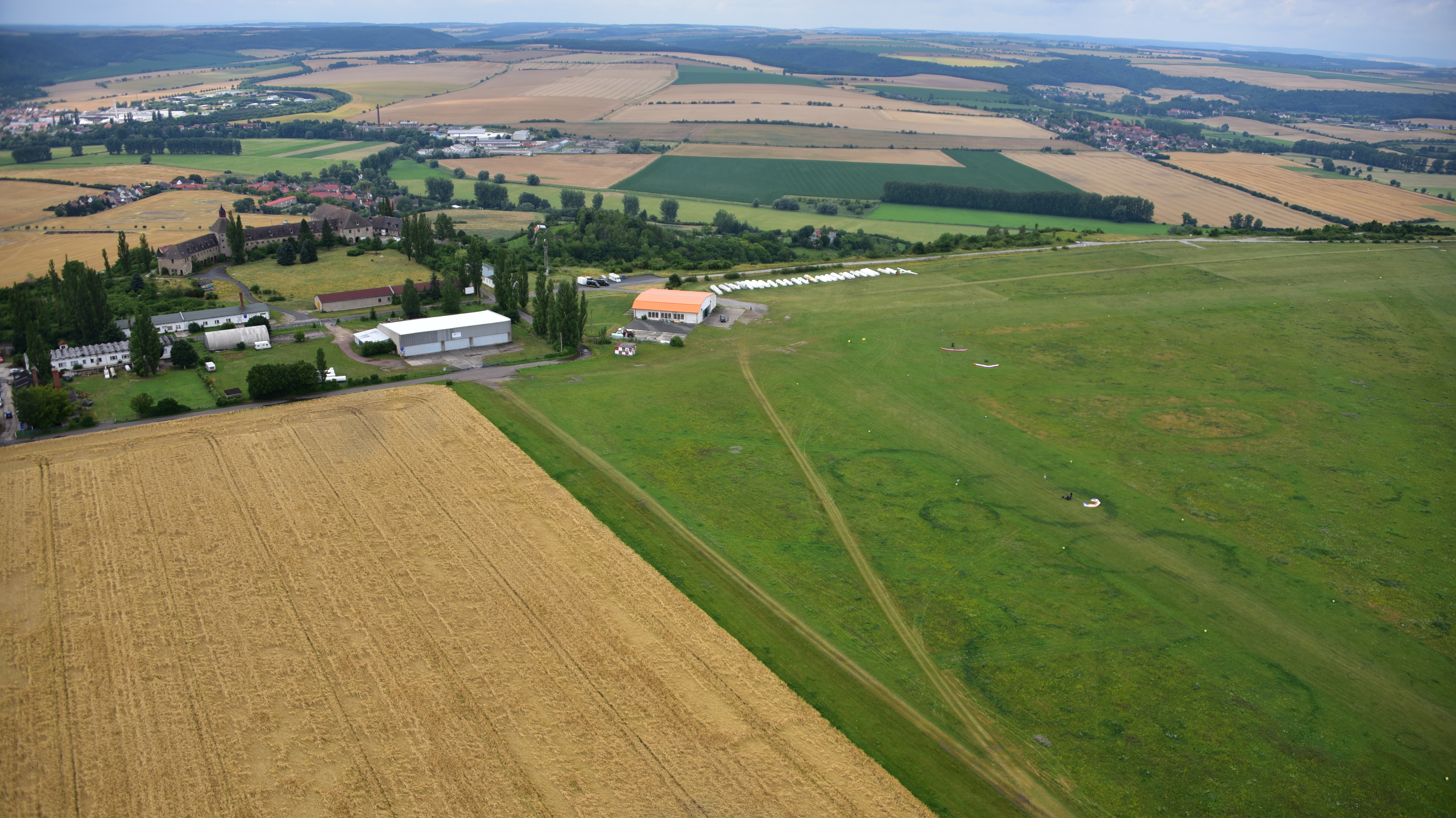 Laucha, Flugplatz, Luftaufnahme (2017)